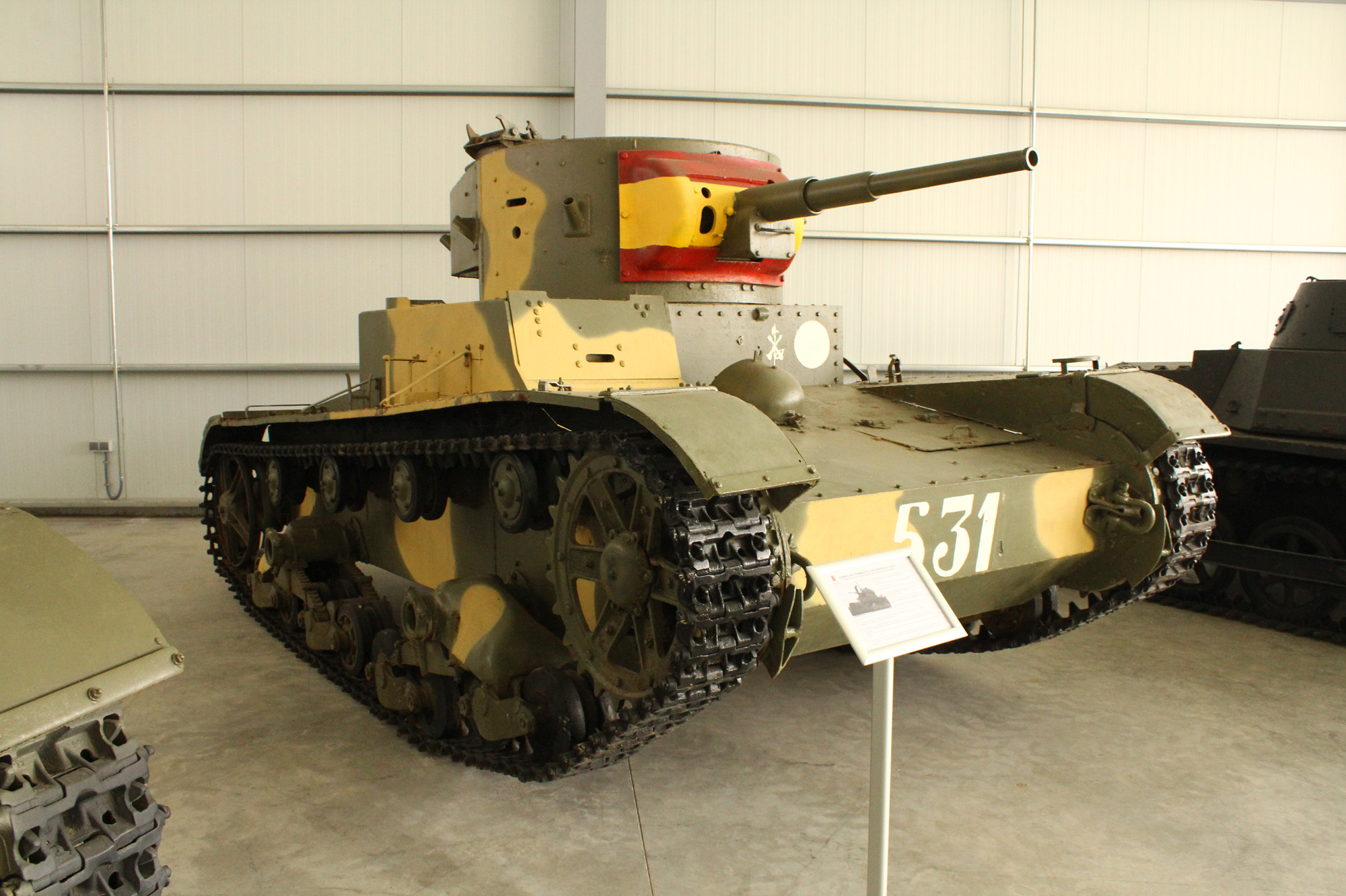 Tanque ligero T-26B, conocido en España como "Vickers". Fabricado en la URSS a partir de 1933, 281 unidades de este tanque llegaron a España durante la Guerra Civil, entre octubre de 1936 y marzo de 1938, sirviendo inicialmente en el bando republicano. 150 tanques T-26B fueron usados por los republicanos en la Batalla de Brunete en julio de 1937, la mayor batalla de tanques de esa contienda. Algunos fueron capturados por el bando nacional. Al terminar la Guerra Civil quedaban 139 unidades en España, que siguieron en activo en el Ejército español hasta la llegada de material estadounidense más moderno en la década de 1950. En el museo se exhiben dos T-26B, uno con el esquema usado por el bando republicano y otro con el esquema usado por los tanques capturados por el bando nacional. Armored Units Museum of El Goloso Light tank T-26B, known in Spain as "Vickers". Made in the USSR from 1933, 281 units of this tank came to Spain during the Civil War, between October 1936 and March 1938, initially serving on the Republican side. 150 T-26B tanks were used by Republicans in the Battle of Brunete in July 1937, the greatest tank battle of the war. Some were captured by the national side. After the Civil War there were 139 units in Spain, which continued active in the Spanish Army until the arrival of modern American material in the 1950s. In the museum are displayed two T-26B, one with the schema used by the Republican side and other one with the schema used by tanks captured by the national side.